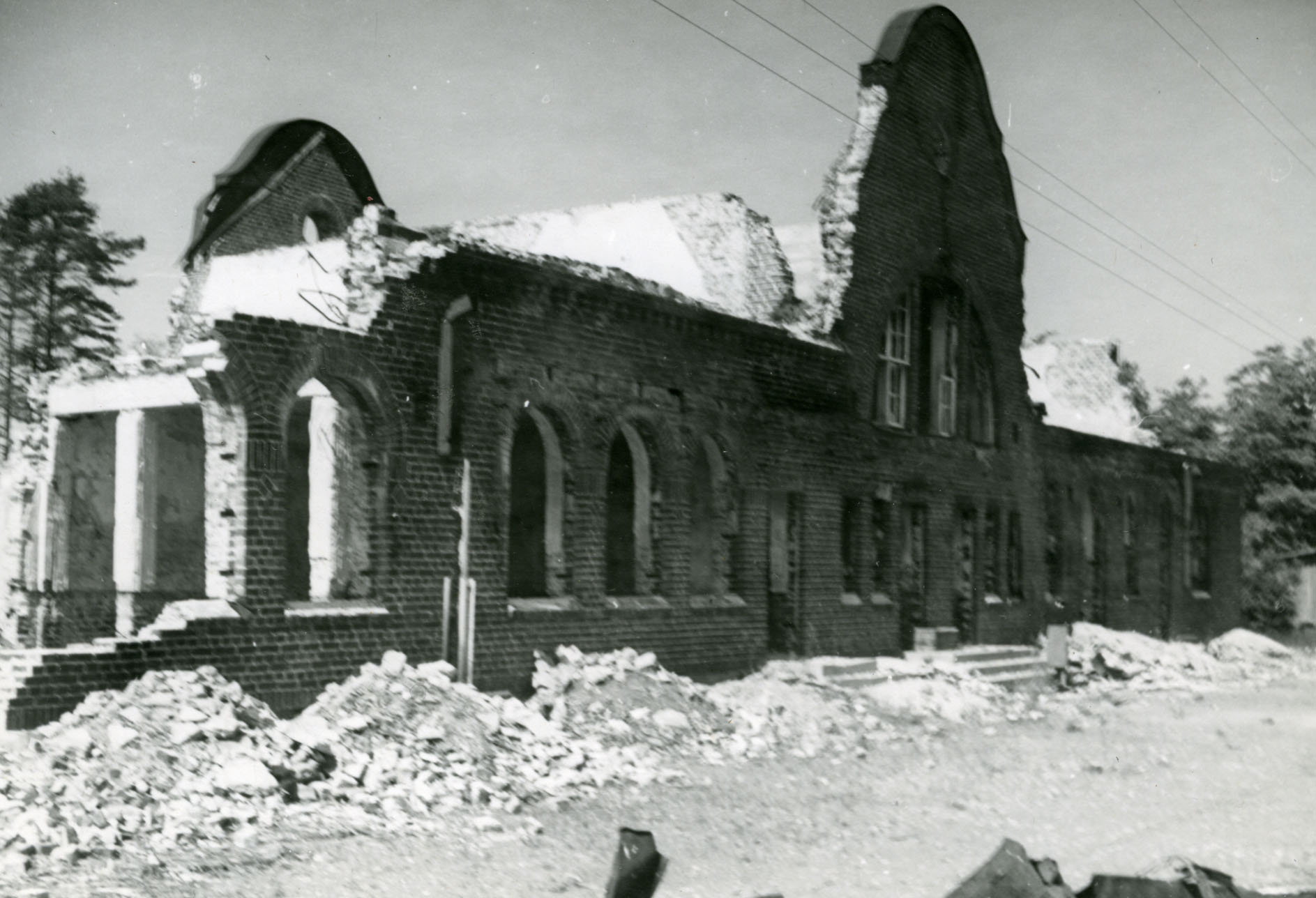 Разрушенный вокзал. 7 июля 1942 год.